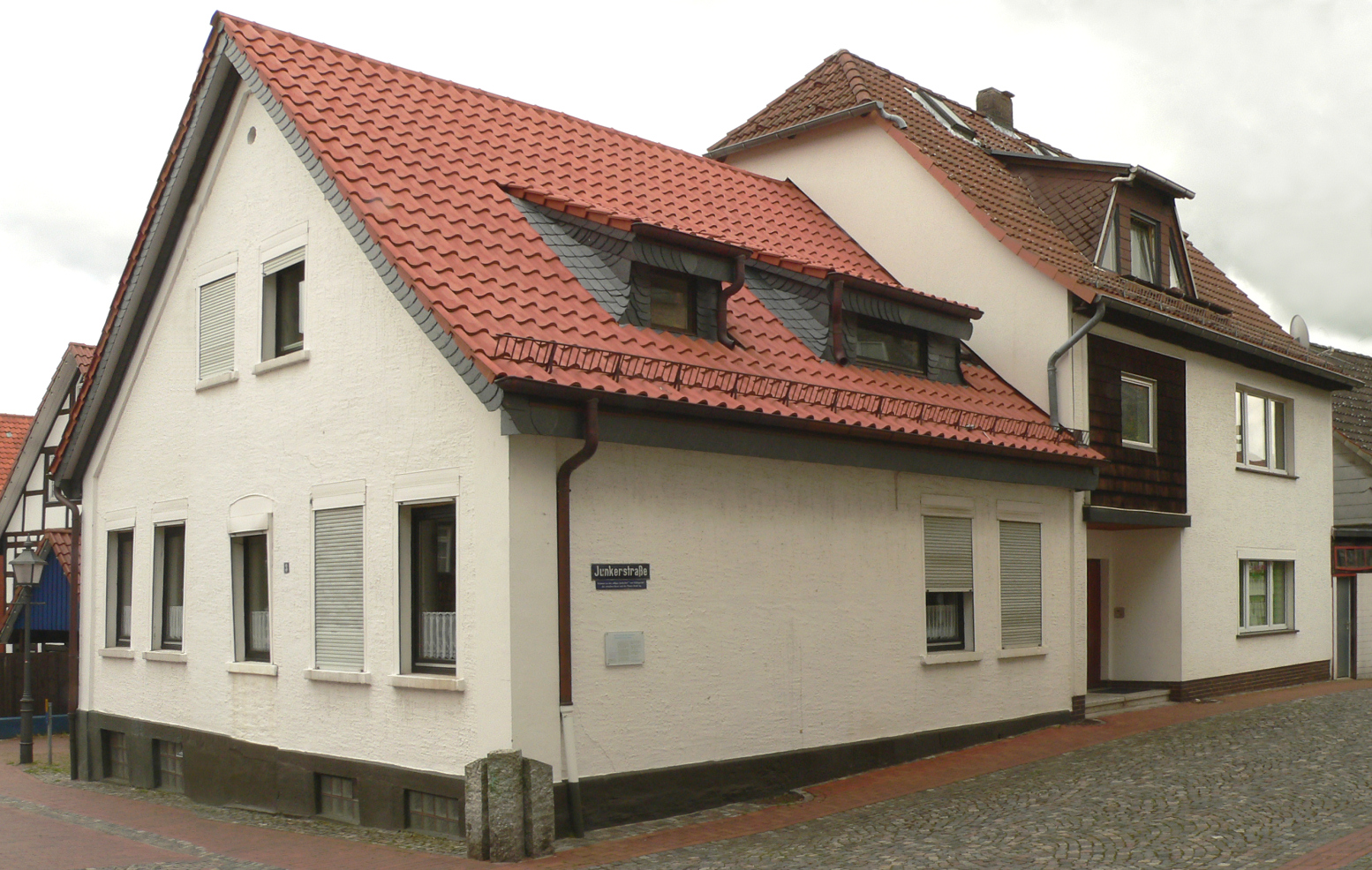 Ehemalige Synagoge Bad Münder, links das als Wohnraum genutzte Vordergebäude, rechts das 1835 erworbene Gebäude für die Einrichtung einer Synagoge, damals ein Fachwerkhaus bis zum Umbau von 1965